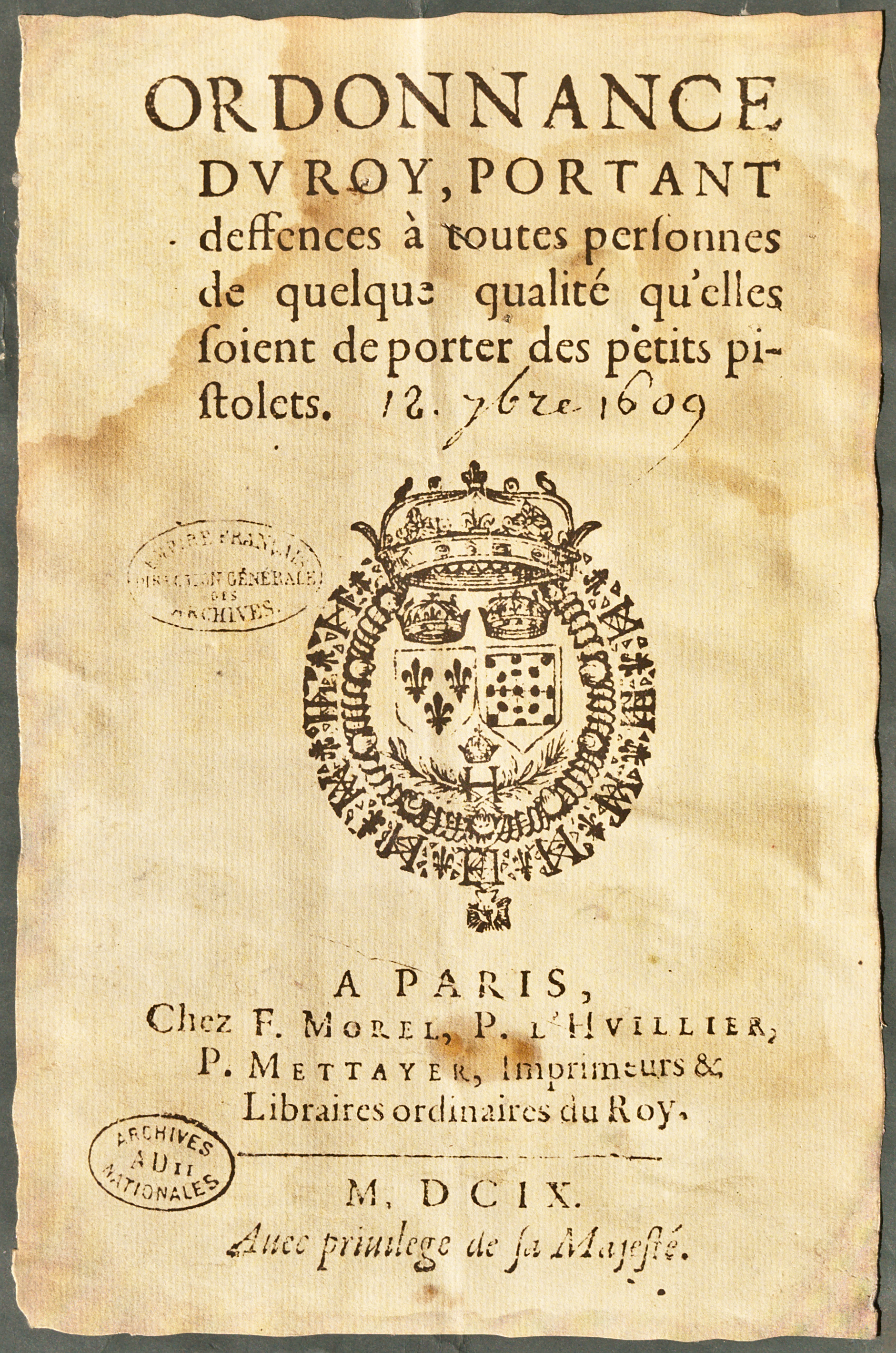 Ordonnance de Henri IV faite en 1609 interdisant le port d'armes. (Photographie d'un fac-similé)